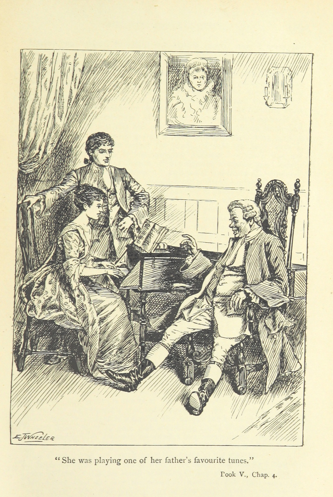 The History of Tom Jones, a foundling, (Tom Jones) Illustration pour le tome V, ch.4